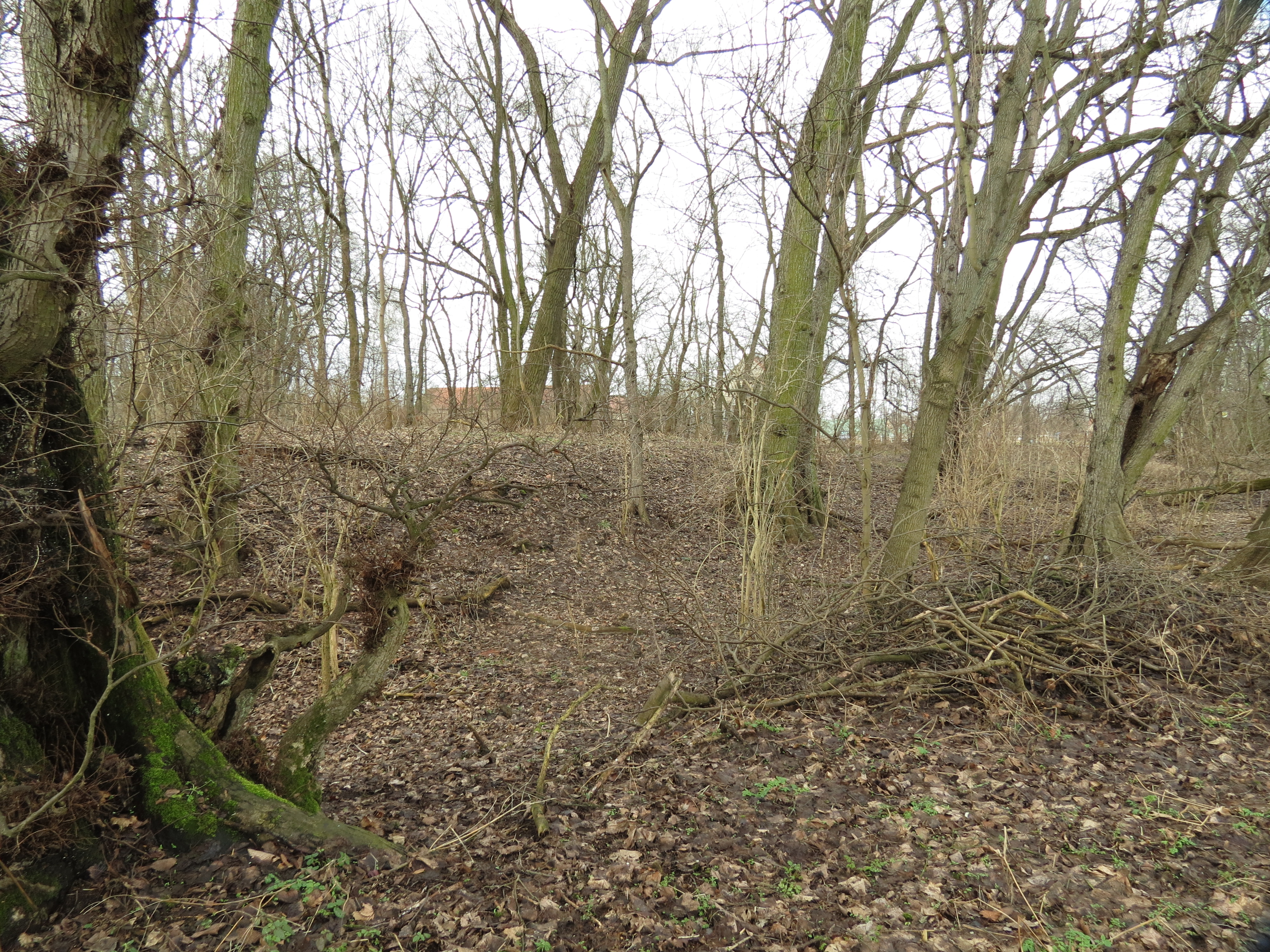 Burghügel des ehemaligen Schlosses Beuthen, bei Kleinbeuthen, Stadt Trebbin, Lkr. Teltow-Fläming, Brandenburg